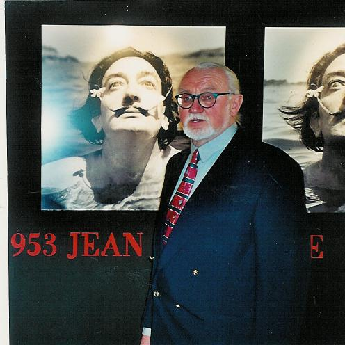 Photo de Roger Michel Erasmy